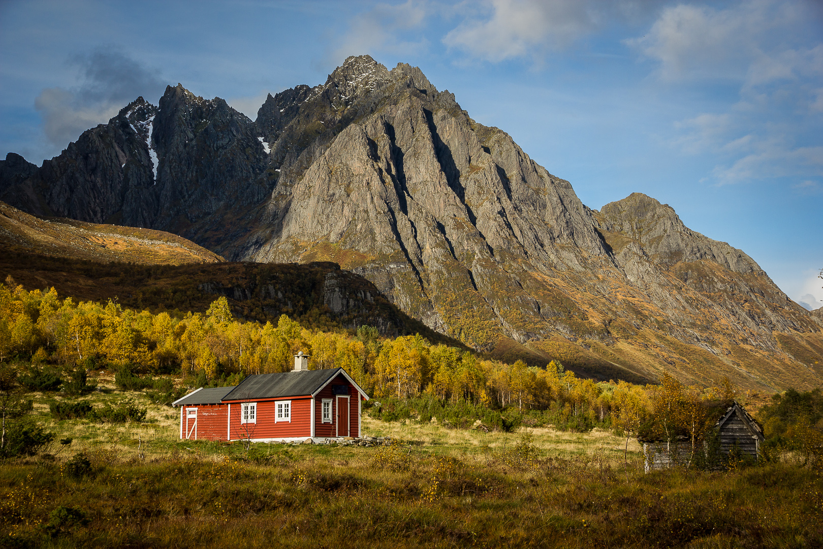 myklebustsætra med sætretindane, sætretind, standalseidet, ørsta, sunnmøre, sunnmørsalpene, sunnmørsalpane